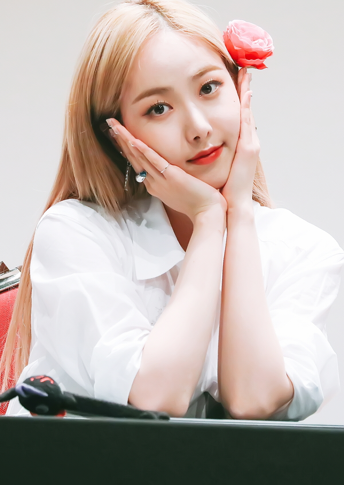 200216 상암 팬사인회 신비 (5)